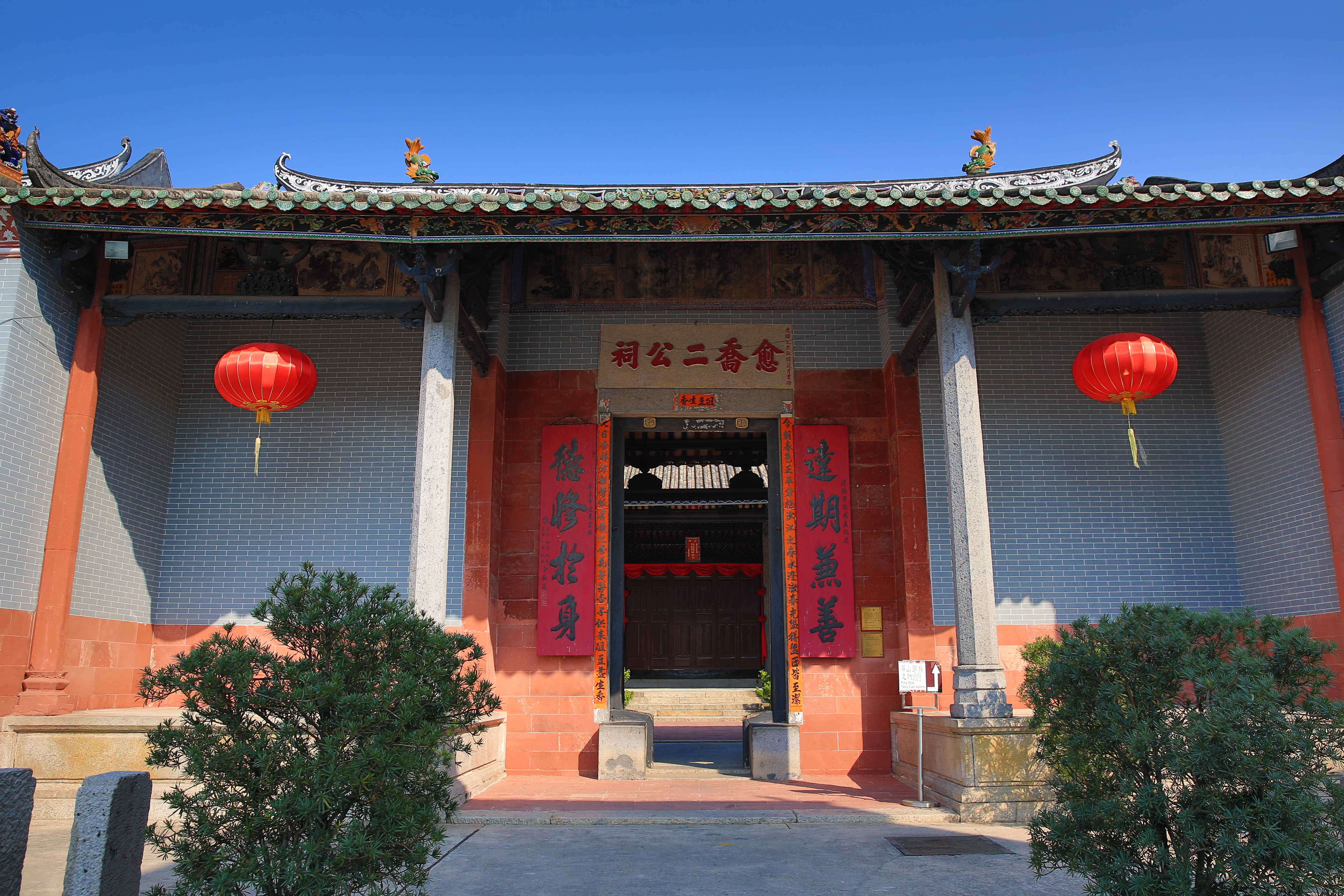 愈喬二公祠坐落於鄧氏宗祠旁邊，為三進兩院式建築，結構和規模與鄧氏宗祠相若。